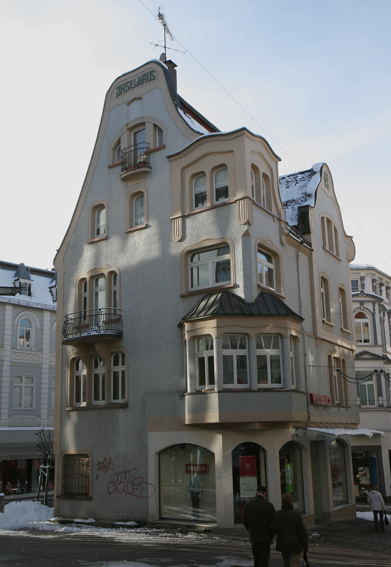 Denkmalgeschütztes Wohn- und Geschäftshaus (Inselhaus) in Lüdenscheid, Karussellplatz 1.